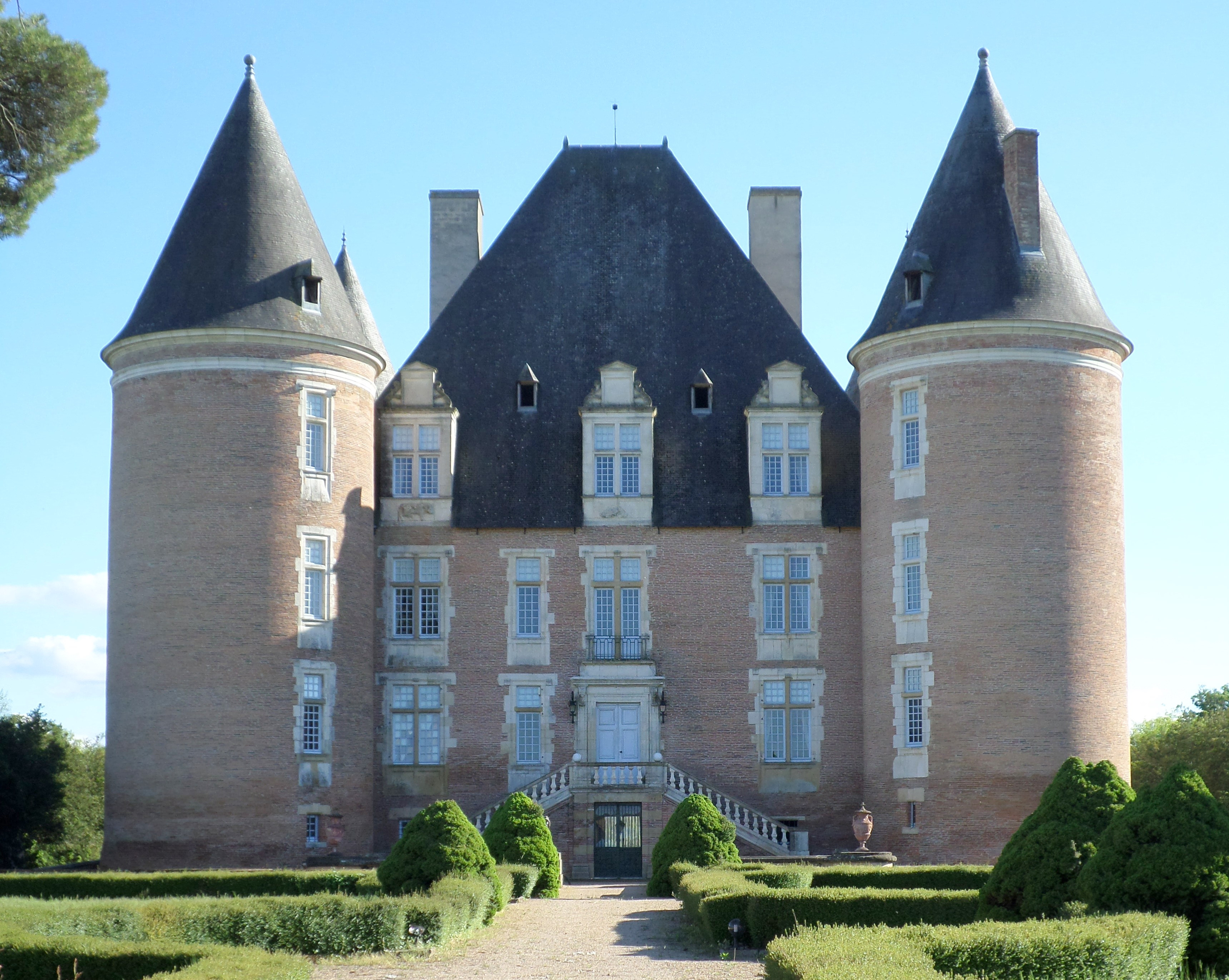 KastellS ent Helitz e Garona-Uhel